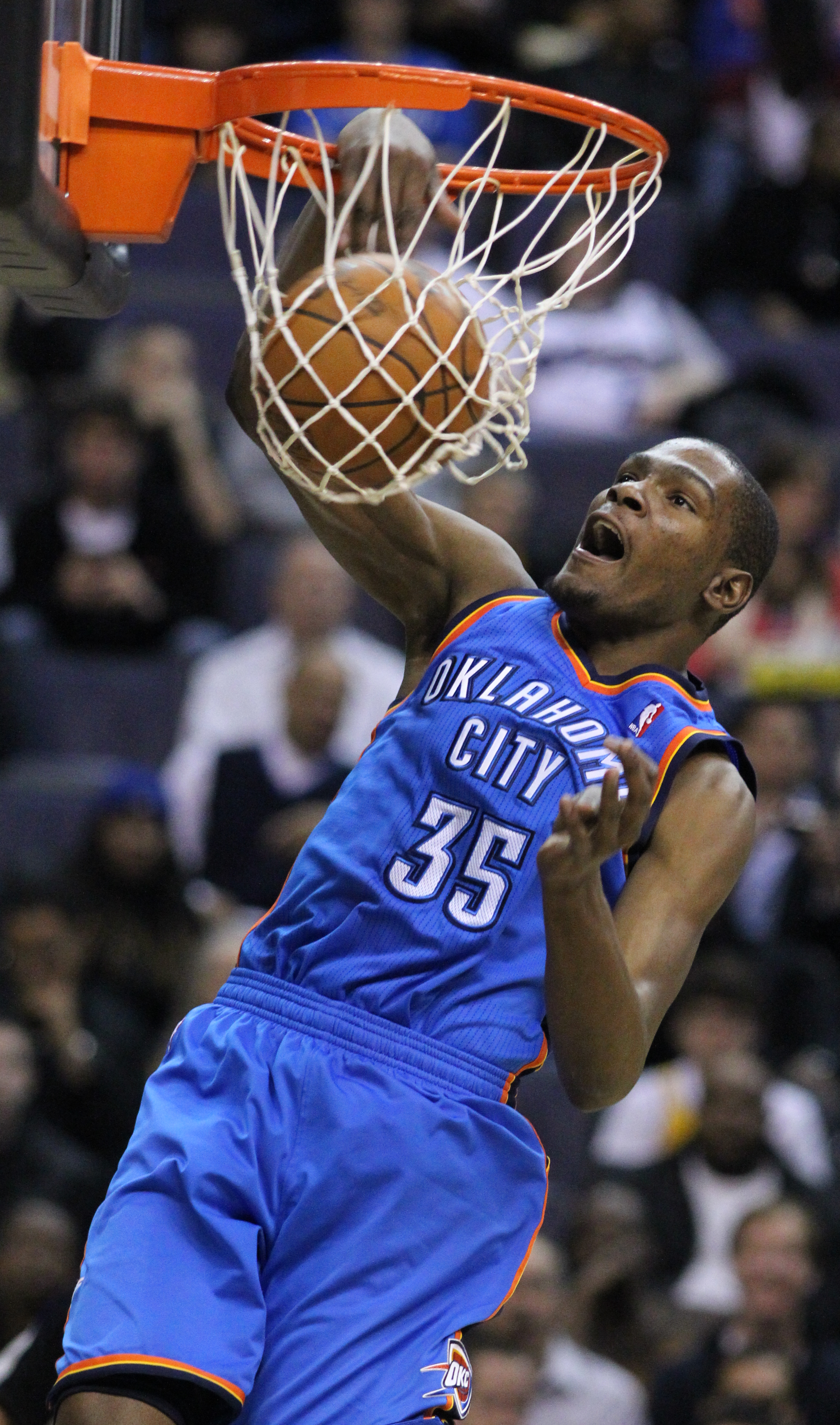 Wizards v/s Thunder 03/14/11